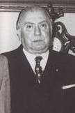 Gustavo Lorca, Humberto Aguirre Doolan, Eduardo Frei y Luis Pareto; políticos chilenos